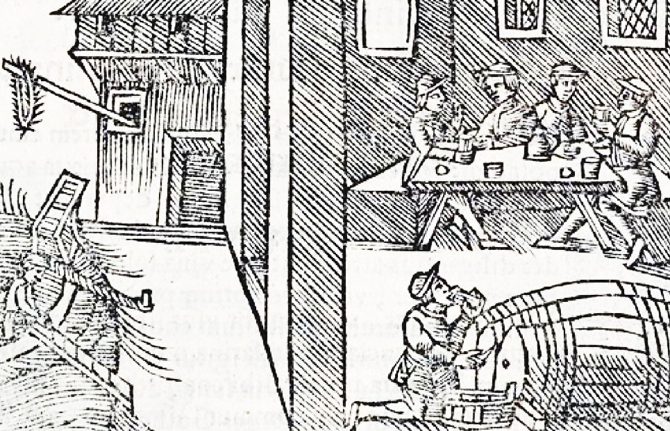 En vinstuga i "Historia om de nordiska folken"